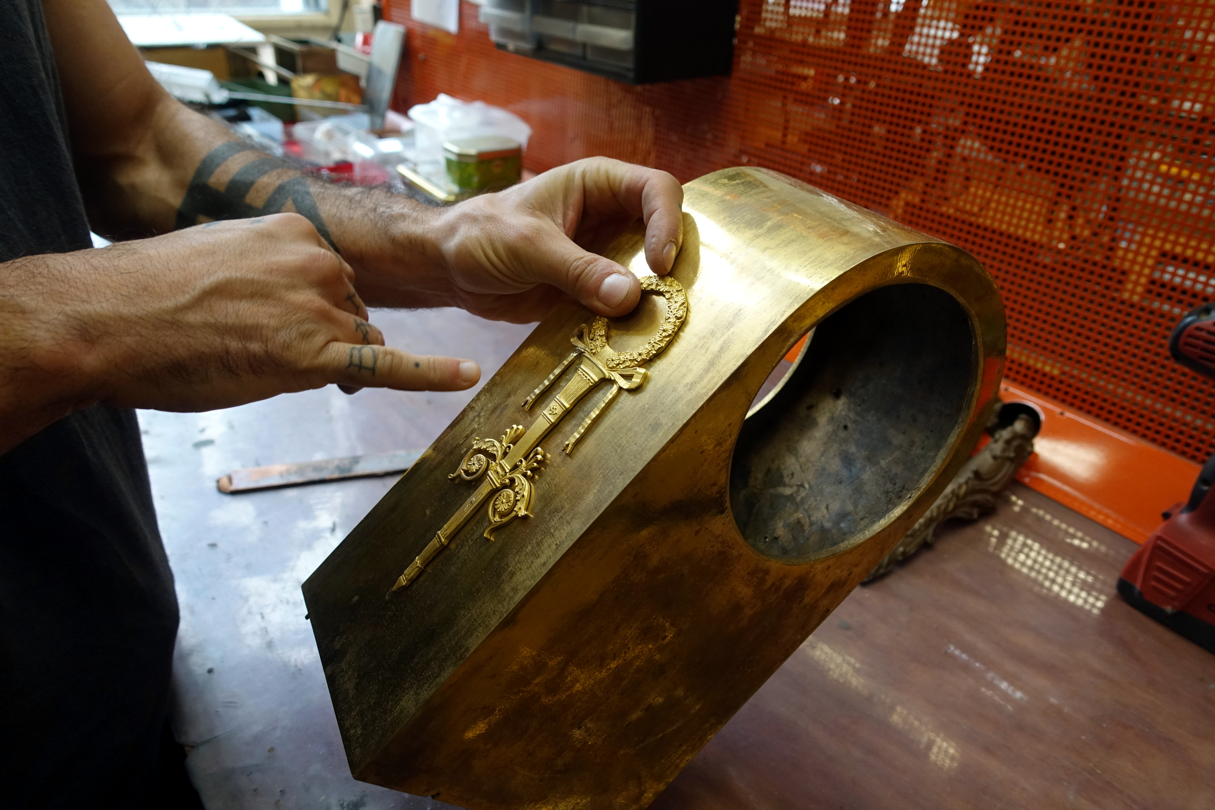 Réparation d'une ornementation d'horloge par ajout d'un morceau de ruban manquant